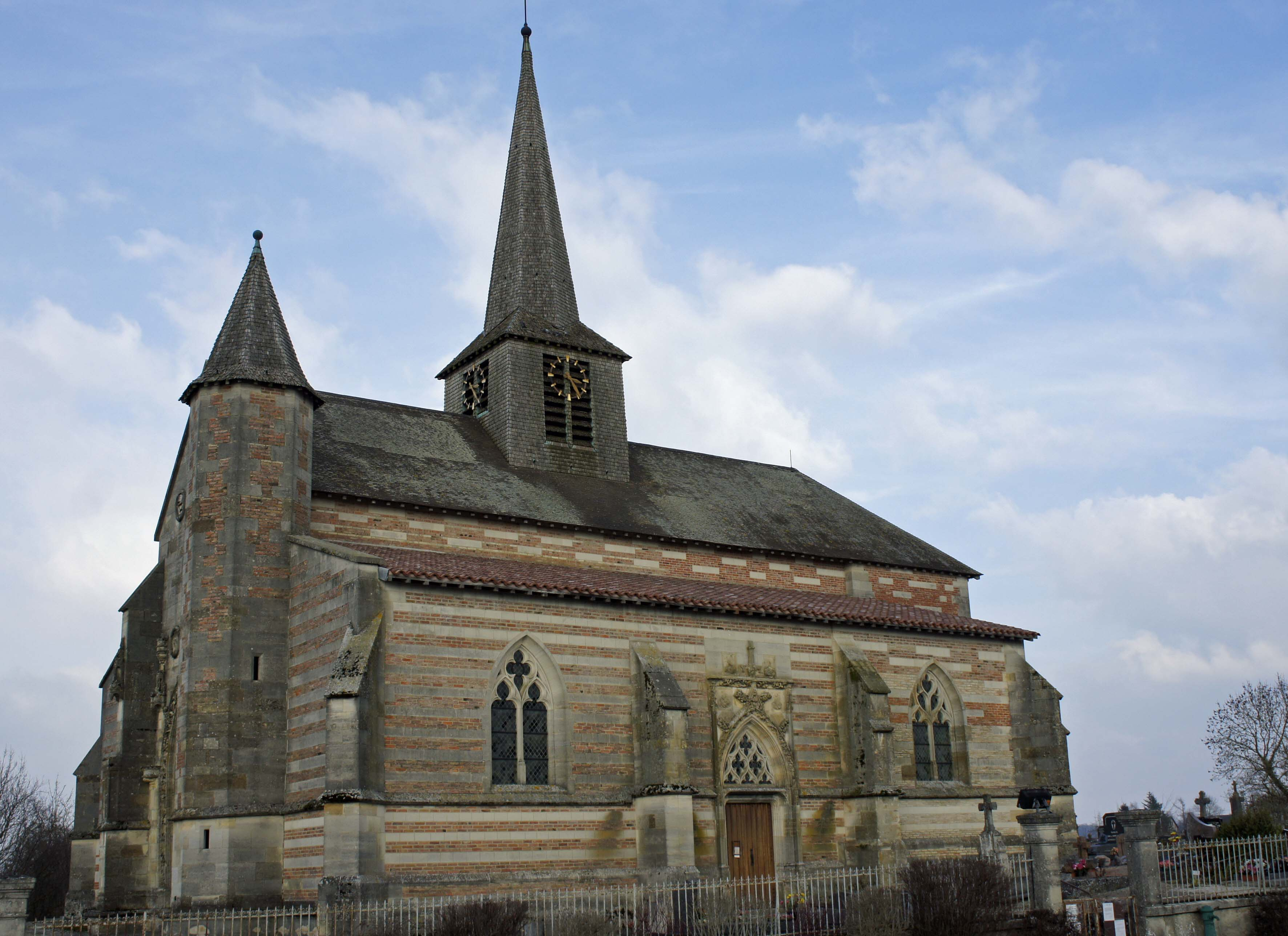 Villers en Argonne, l'église.